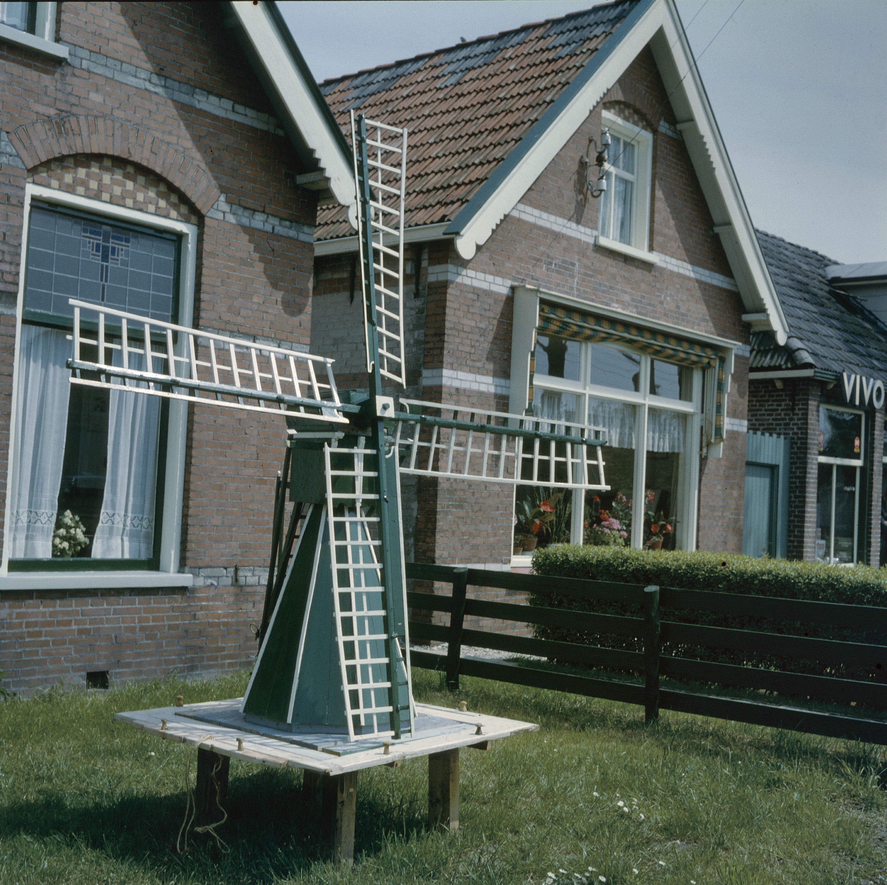 Molen/ Miniatuur: Speelmolen (opmerking: Diacollectie Molens)